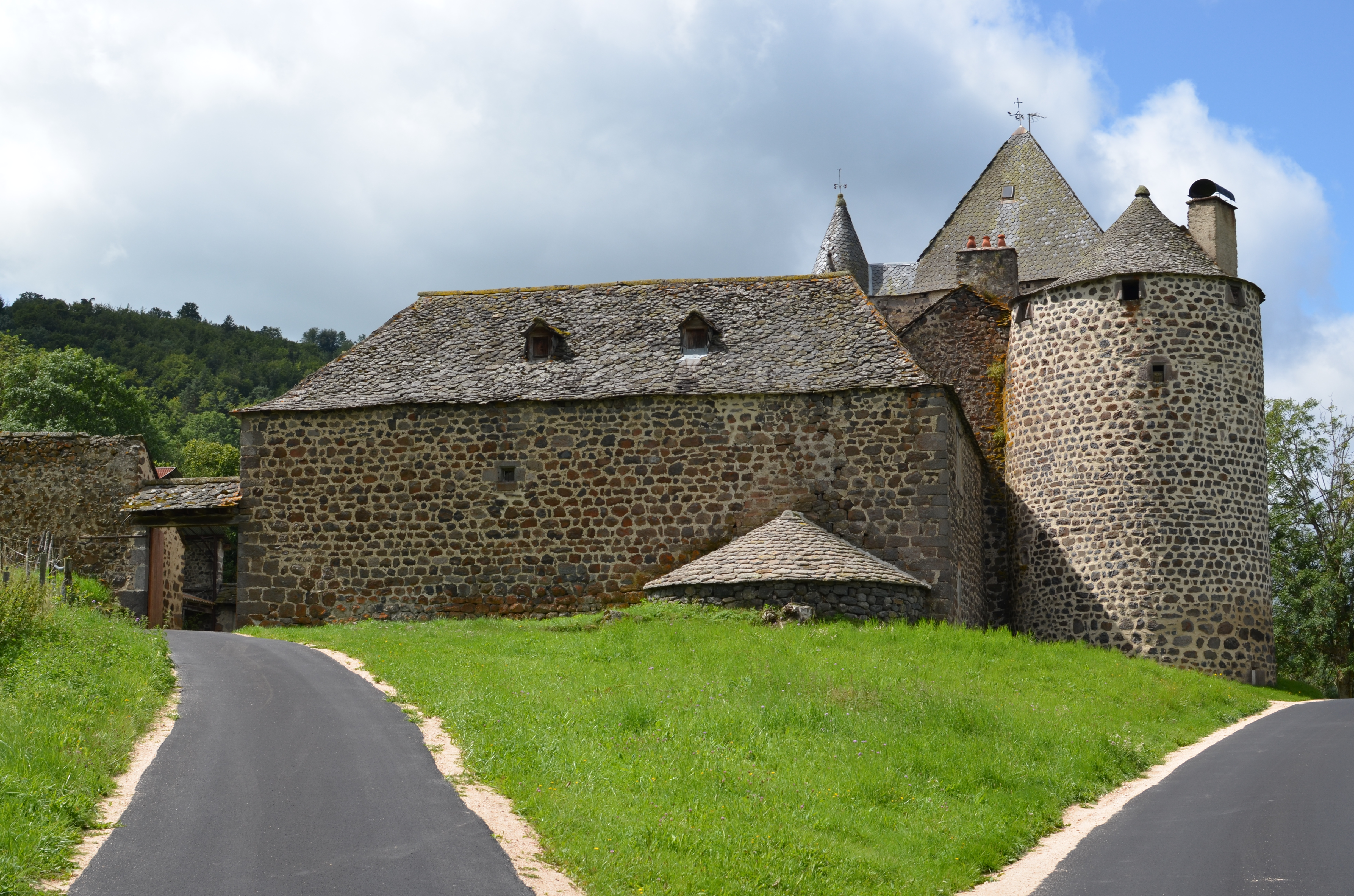 Château du Jarrousset .